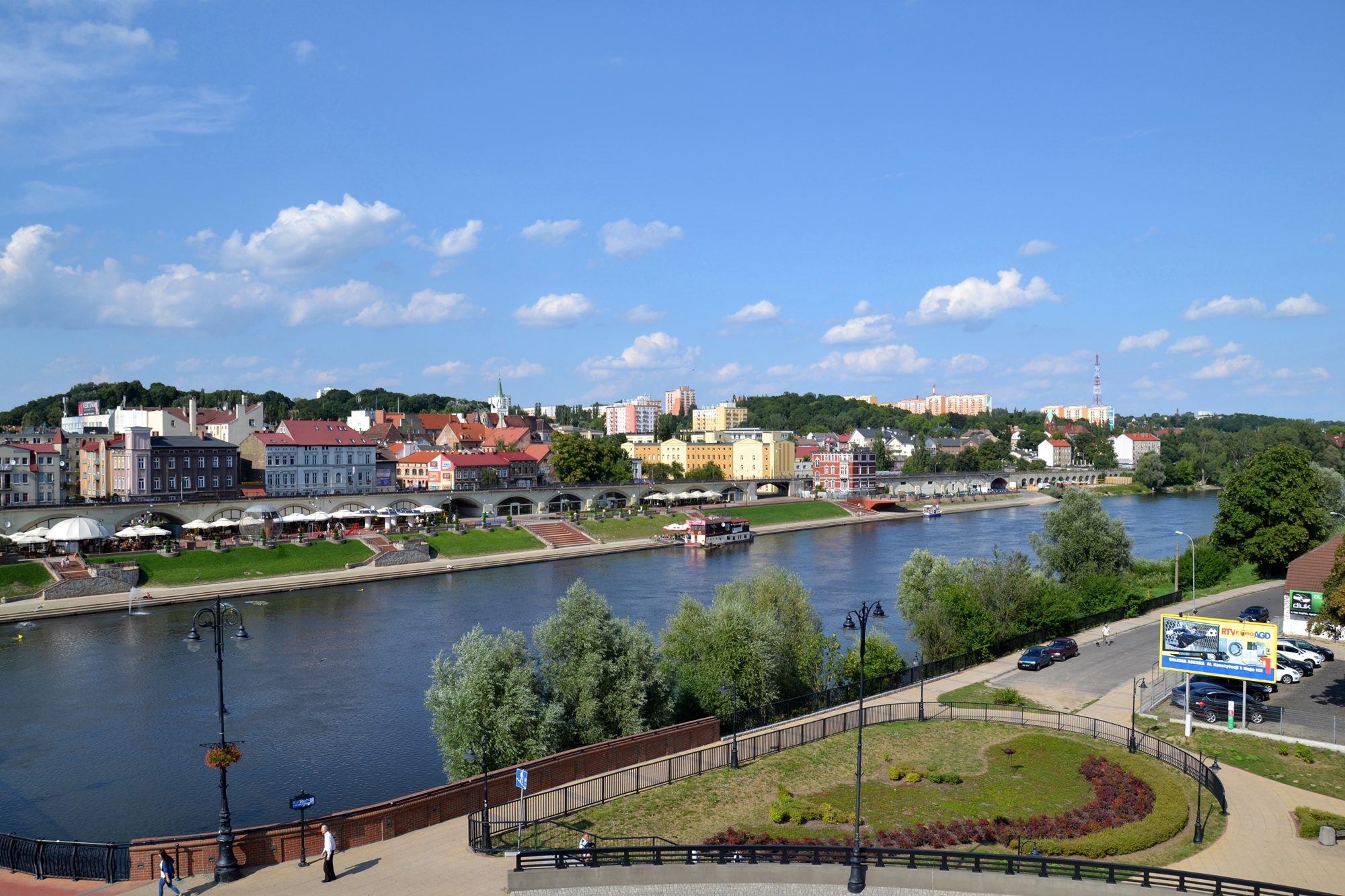 Widok na bulwary w Gorzowie Wielkopolskim z tarasu widokowego